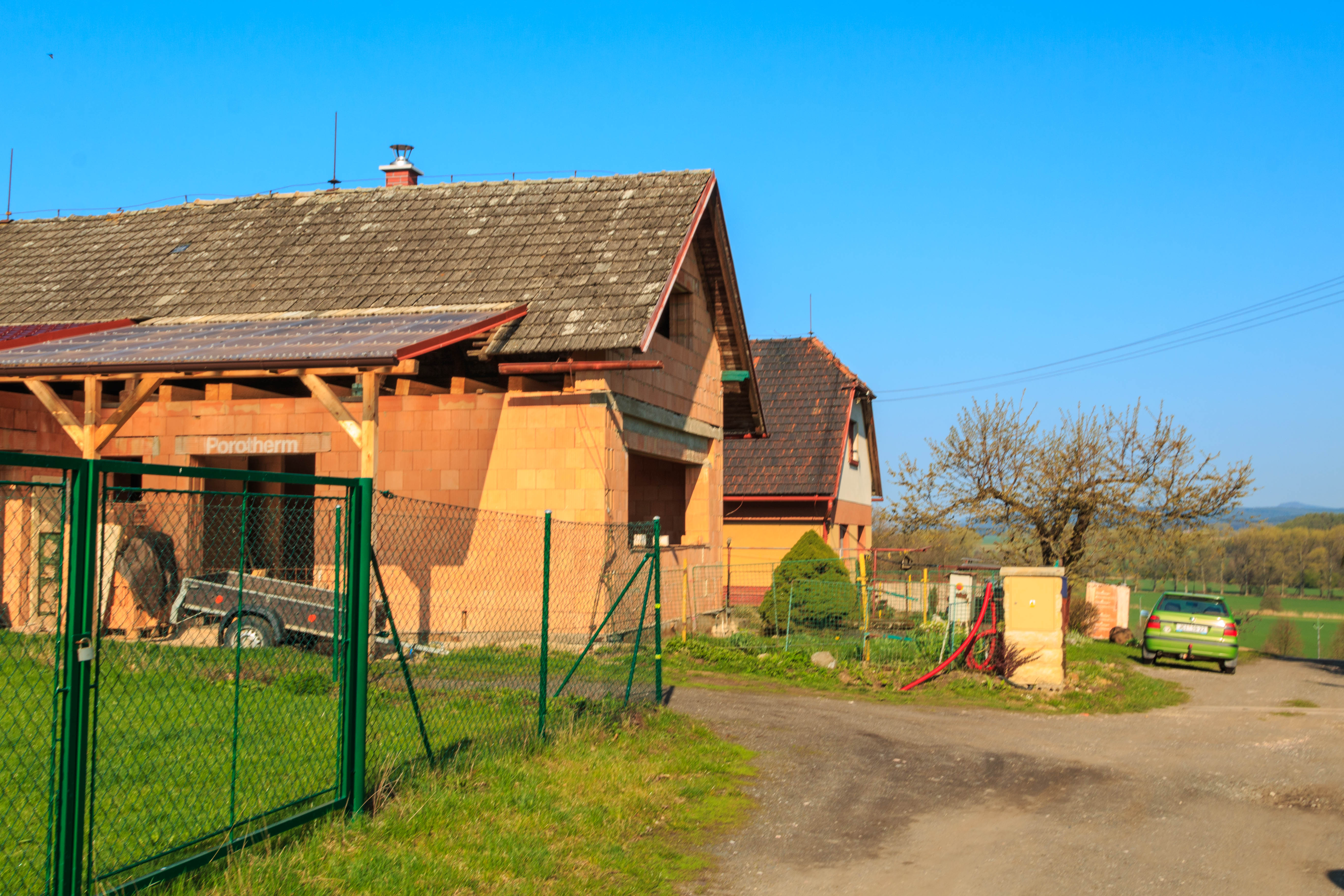 Bertoldka - dům čp. 6